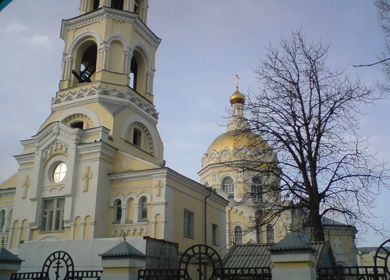 Вид со стороны СГУ